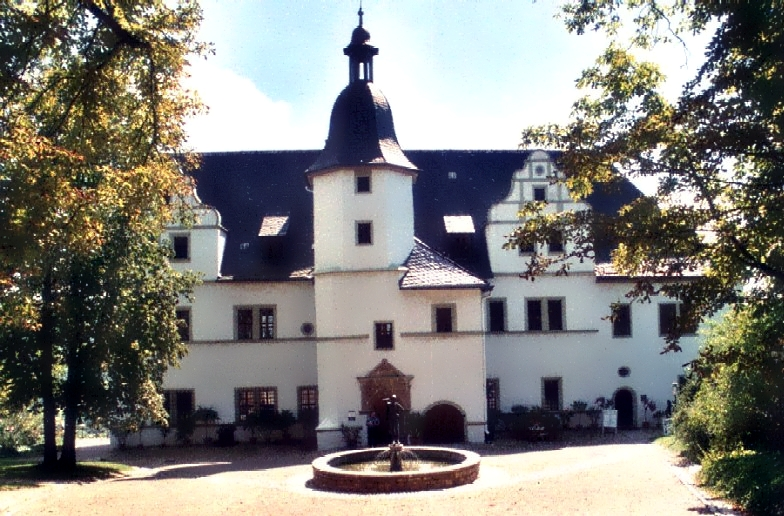 Dornburg - Renaissanceschloß - Stadtseite